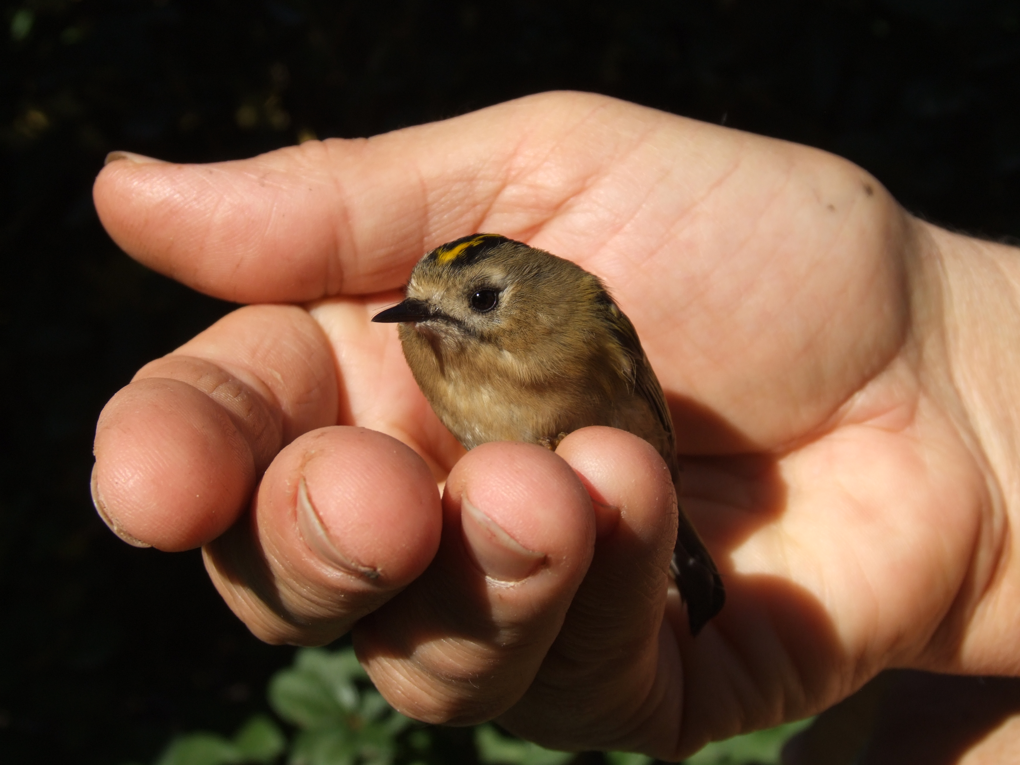 Sárgafejű királyka (Regulus regulus)